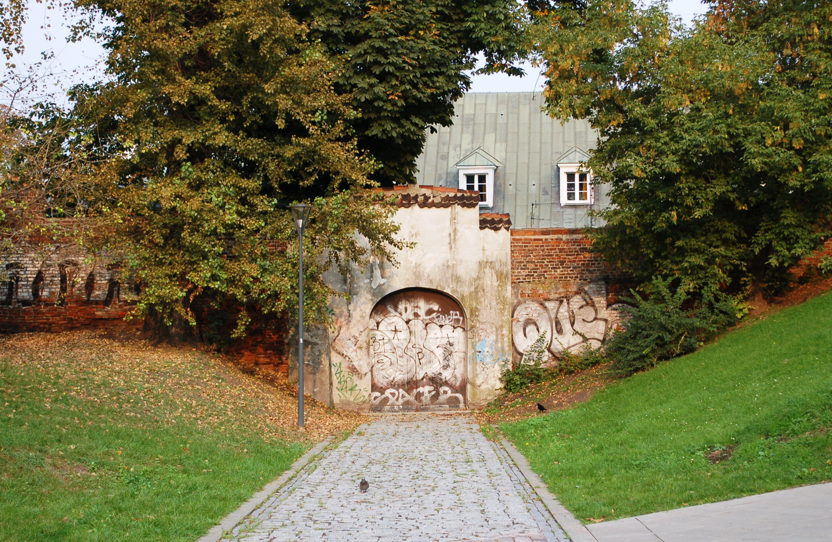 Kloster Warschau